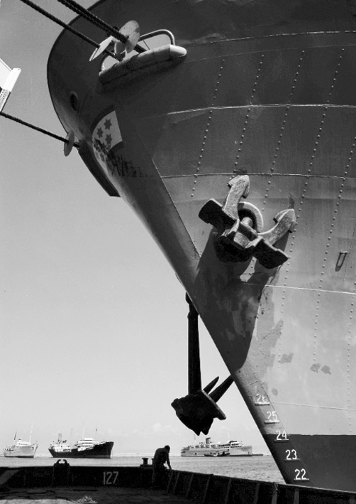 נמל חיפה